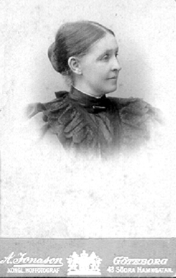 Retrato de Zelma Wilskman, madre del músico almerienso Olallo Morales Wilskman